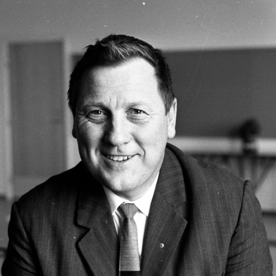 Gnesta-Kalle, Rune Gnestadius 1967